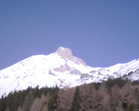 Monte Camicia depuis Monte Vetica